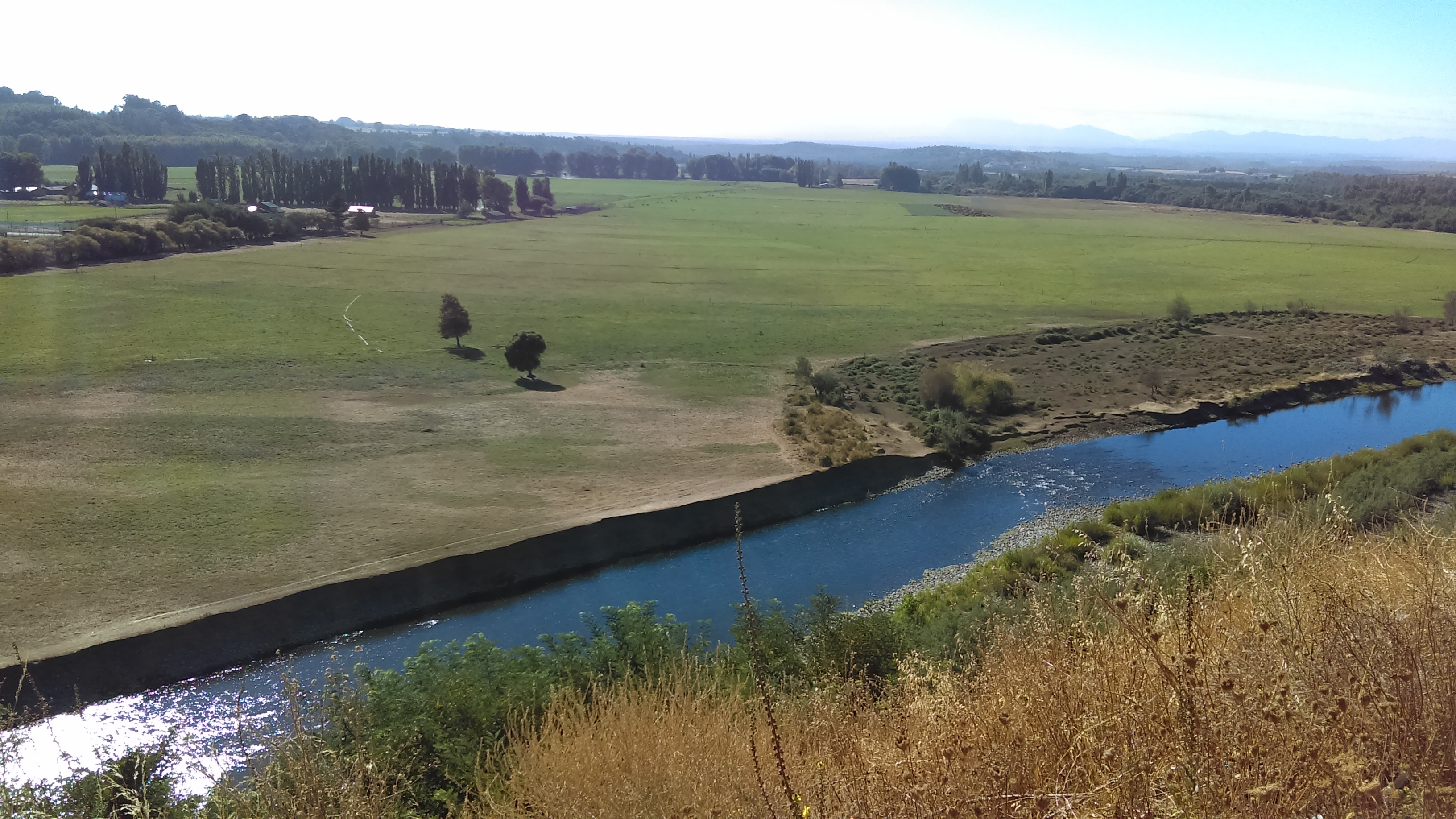 Mirador al costado del cementerio de Mulchén, se observa el río Bureo